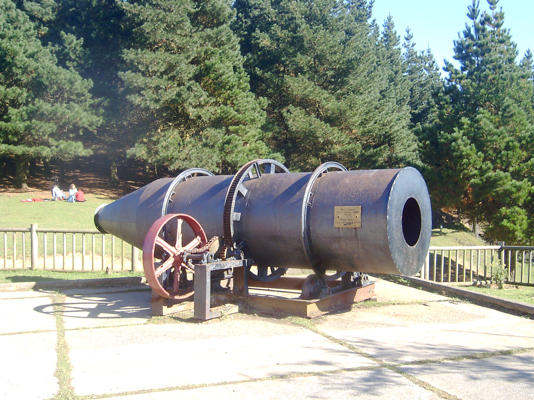 Peñas negras ezagutzeko zentroa